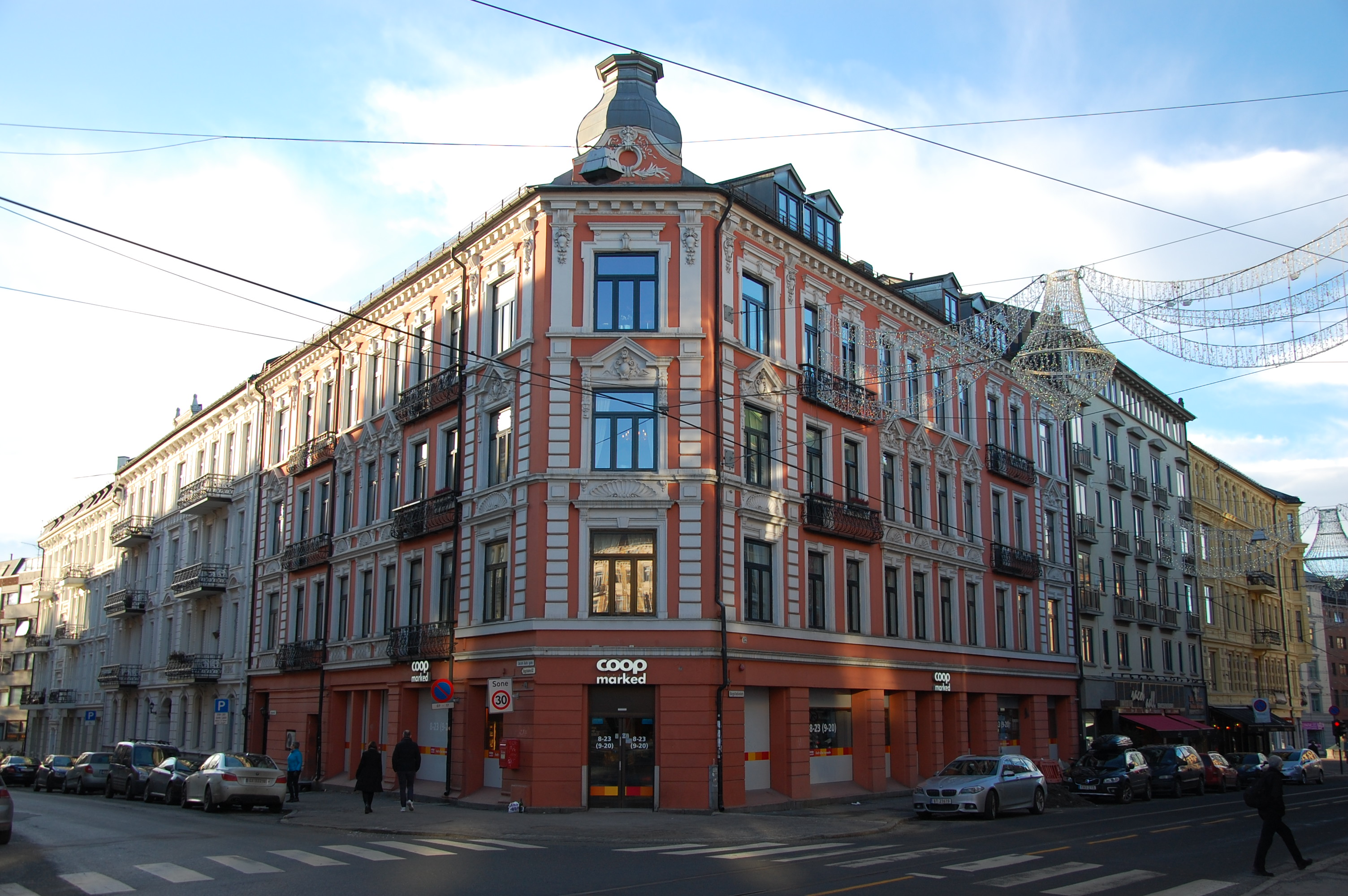 Bogstadveien 62, murgård fra 1896.